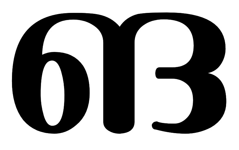 ങ അക്ഷരം